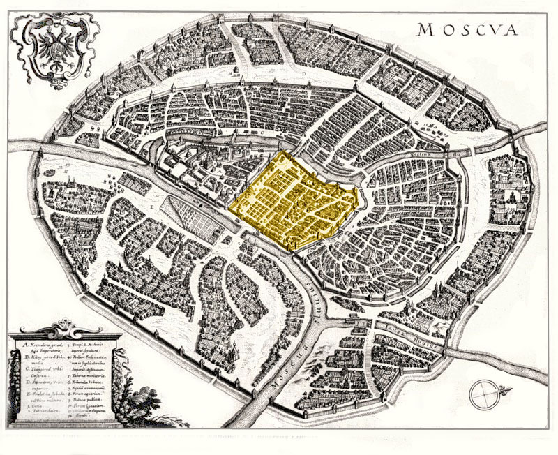 Территория Китай-города отмечена жёлтым цветом на плане Маттеуса Мериана. 1638